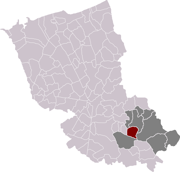 Locatie gemeente Merris in arrondissement Duinkerke. Zelfgemaakt. Location of Merris municipality in the arrondissement of Dunkirk. Self made. Localisation de la commune de Merris dans l'arrondissement de Dunkerque. Fait moi-même.